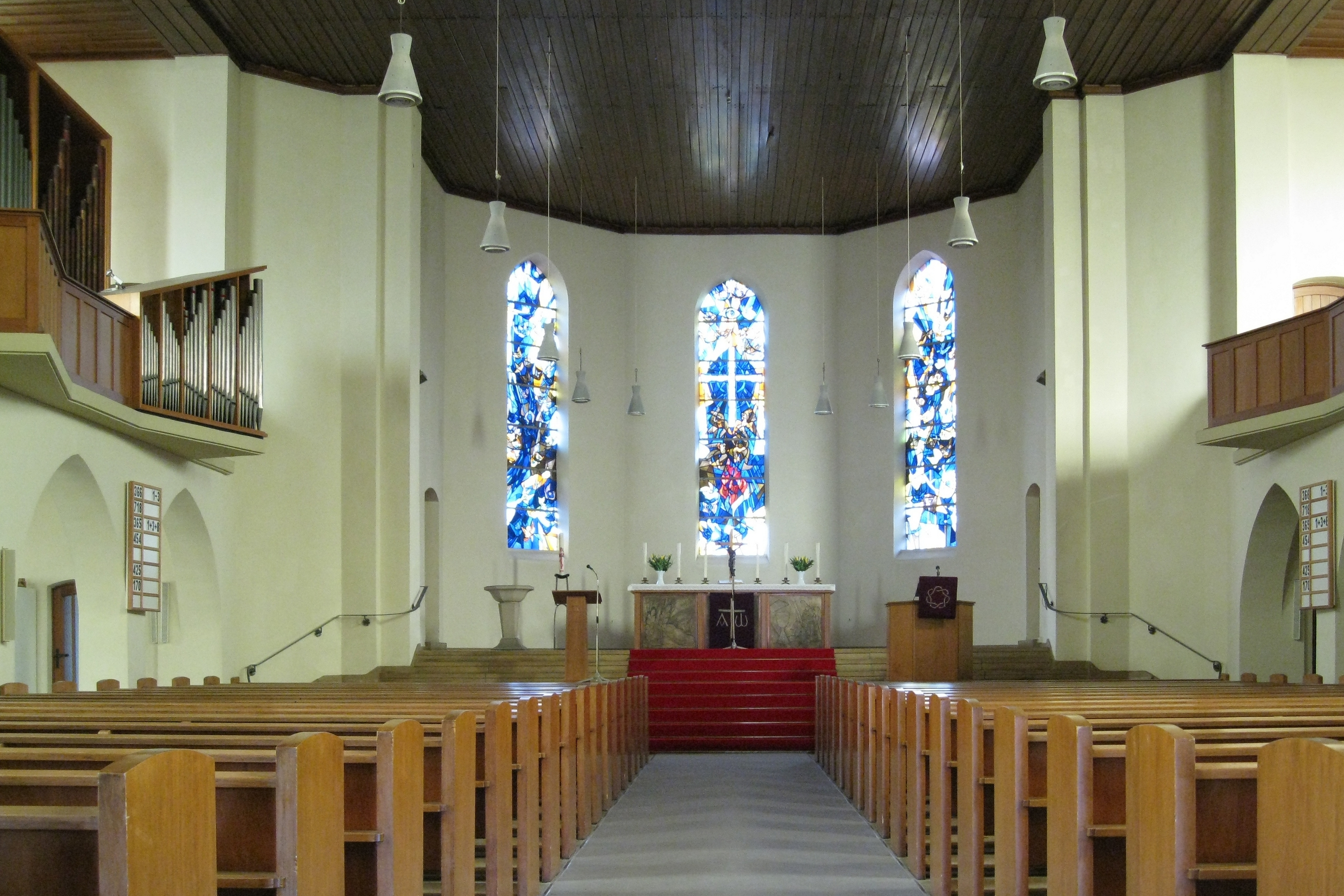 Innenraum der Segenskirche (Berlin-Reinickendorf), fotografiert von der Straße aus, durch die geöffnete Portaltür